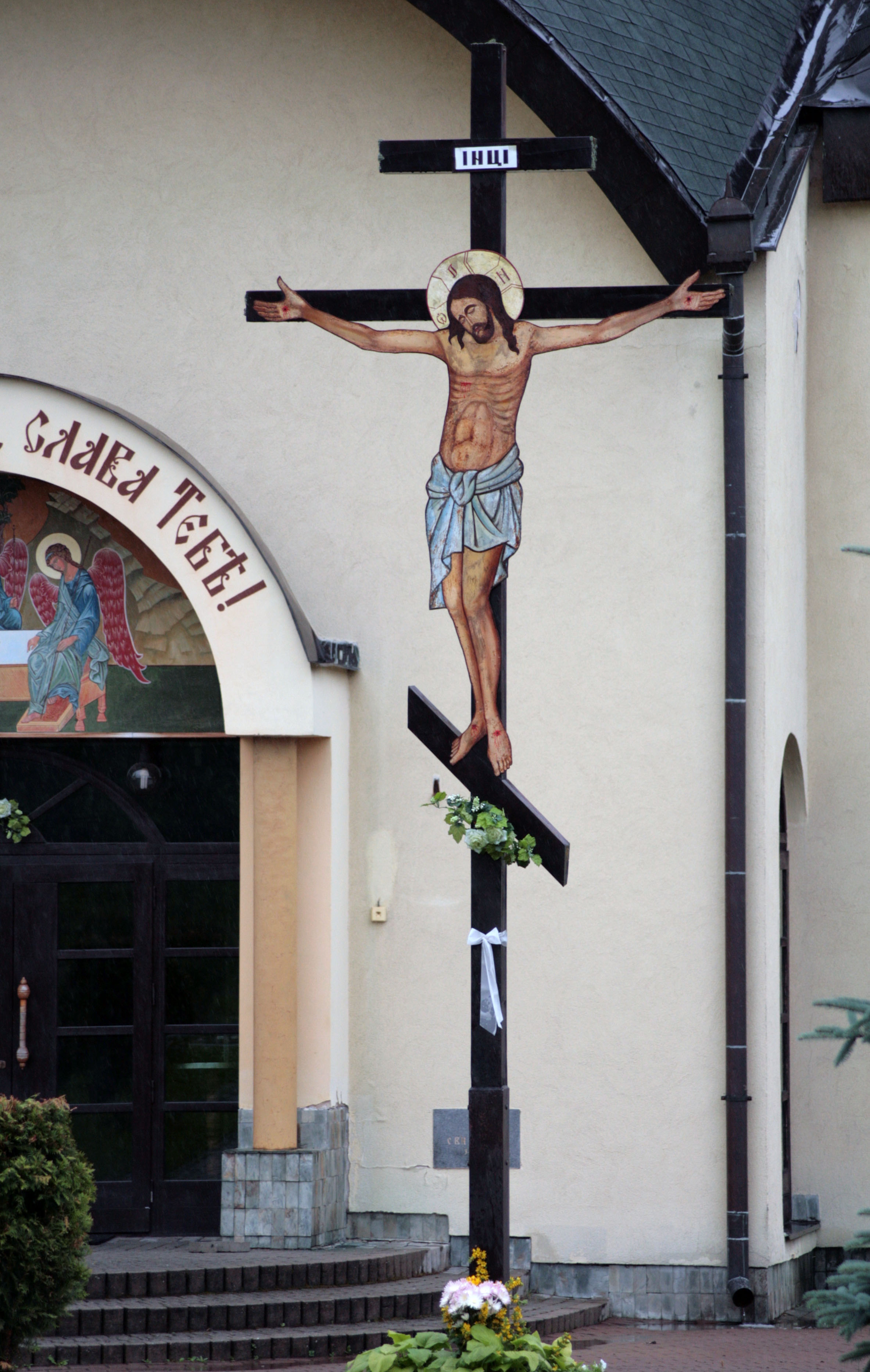 Pravoslávny kríž pred vstupom do cerkvi